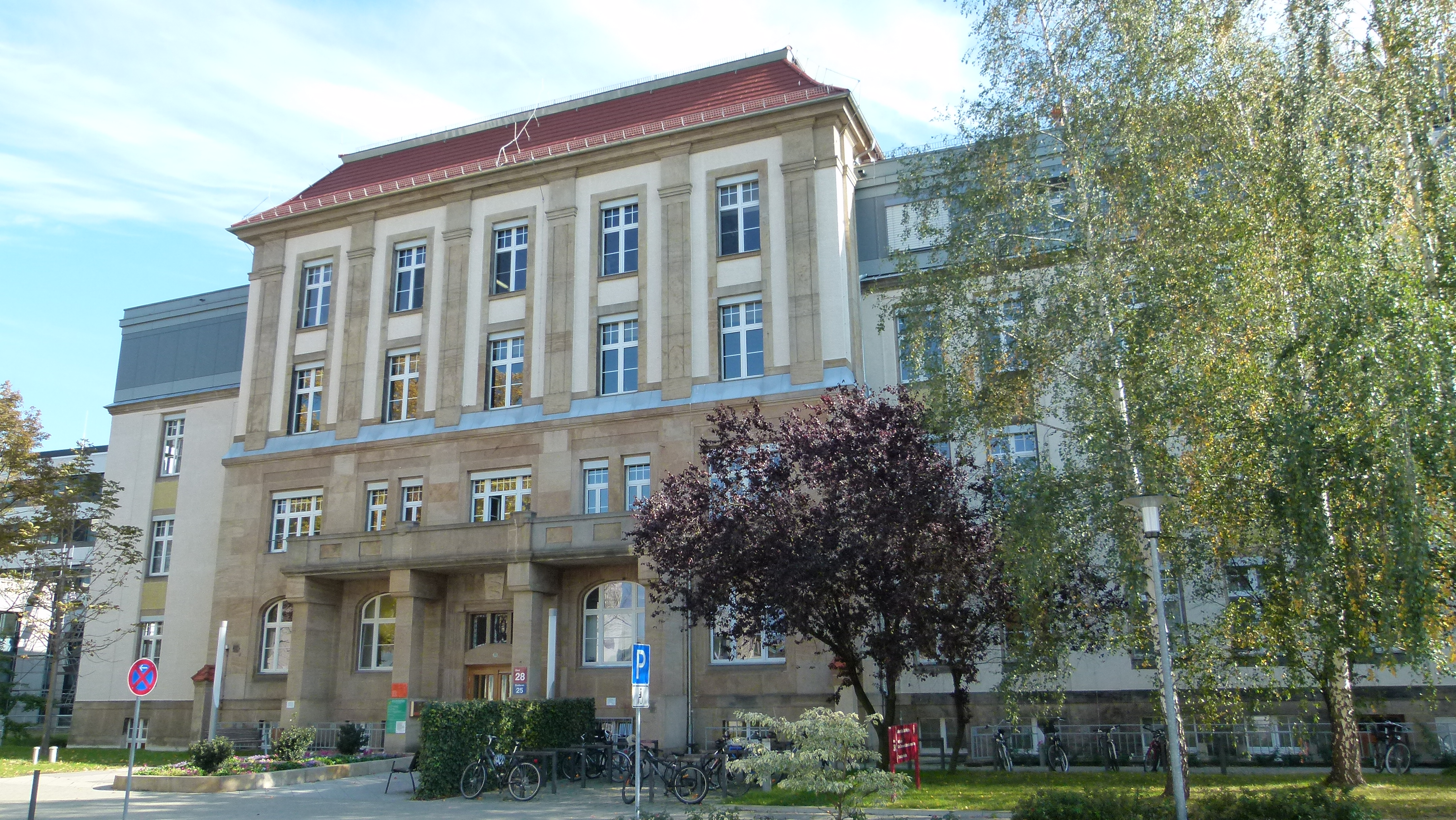 Denkmalgeschütztes Haus, Fiedlerstraße 25, Altstadt II, Dresden